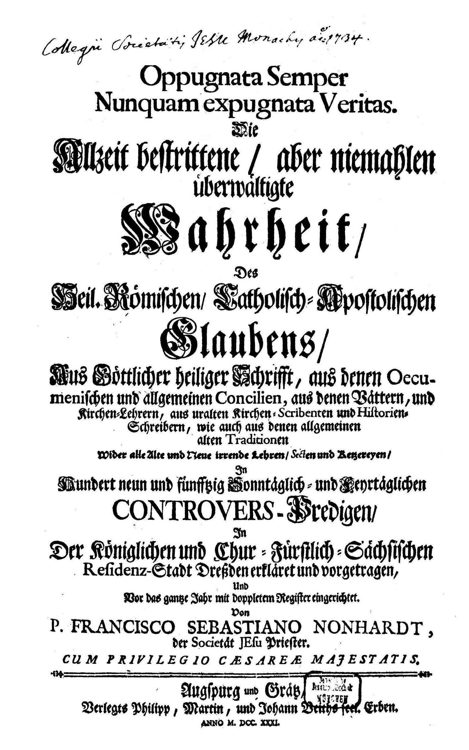 Oppugnata Semper Nunquam expugnata Veritas. Die Allzeit bestrittene / aber niemahlen überwältigte Wahrheit / Des Heil. Römischen / Catholisch=Apostolischen Glaubens / Aus Göttlicher heiliger Schrifft, aus denen Oecumenischen und allgemeinen Concilien, aus denen Vättern, und Kirchen=Lehrern, aus uralten Kirchen=Scribenten und Historien=Schreibern, wie auch aus denen allgemeinen alten Traditionen Wider alle Alte und Neue irrende Lehren / Secten und Ketzereyen In Hundert neun und fünffzig Sonntäglich= und Feyrtäglichen CONTROVERS-Predigen / In Der Königlichen und Chur=Fürstlich=Sächsischen Residenz-Stadt Dreßden erkläret und vorgetragen / Und Vor das gantze Jahr mit doppletem Register eingerichtet. Von P. FRANCISCO SEBASTIANO NONHARDT, der Societät JEsu Priester. CUM PRIVILEGIO CAESAREAE MAJESTATIS. Augspurg und Gratz, Verlegts Philipp, Martin, und Johann Veiths seel. Erben. ANNO M. DCC. XXXI.